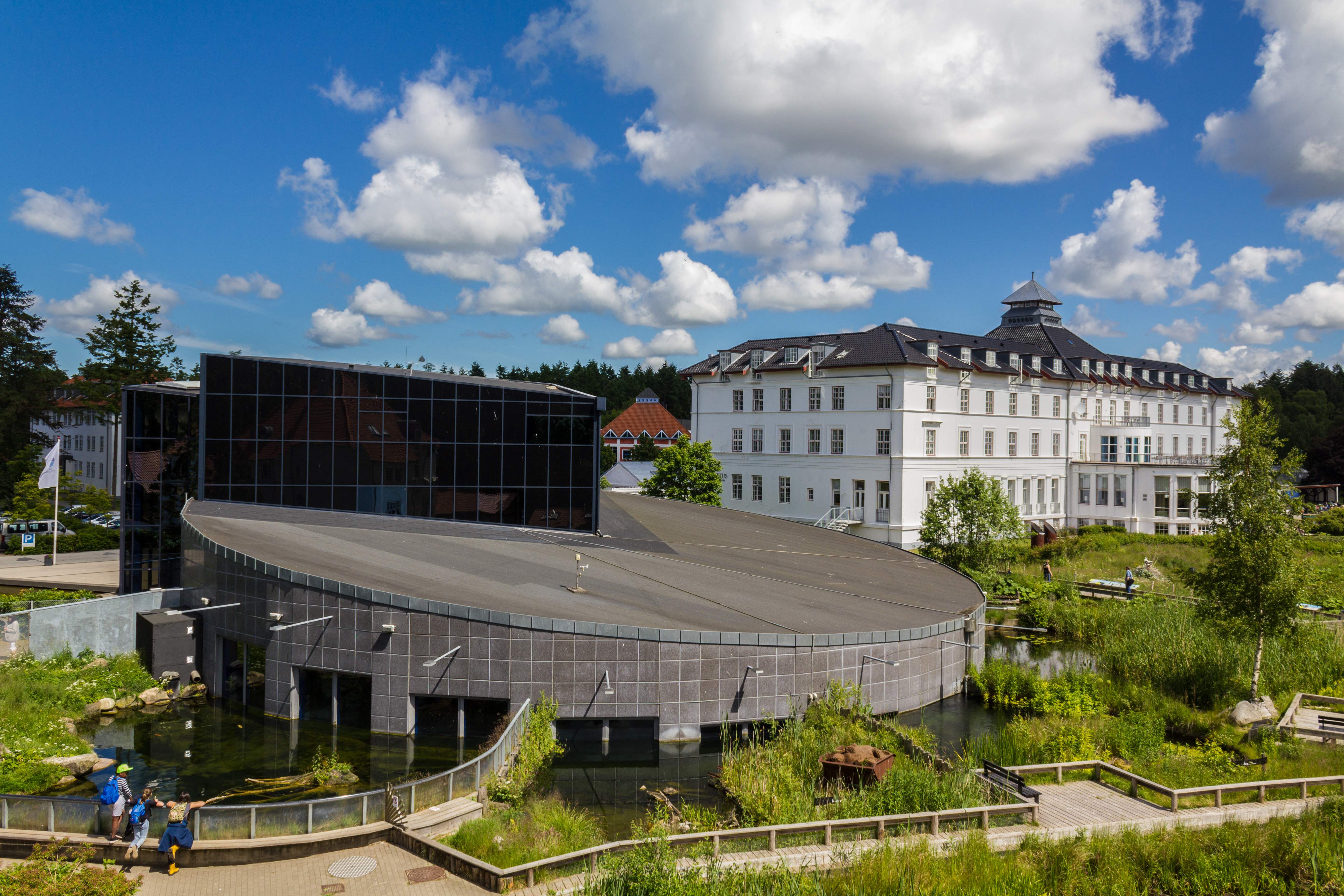 AQUA Akvarium & Dyrepark med hotellet Vejlsøhus i baggrunden.